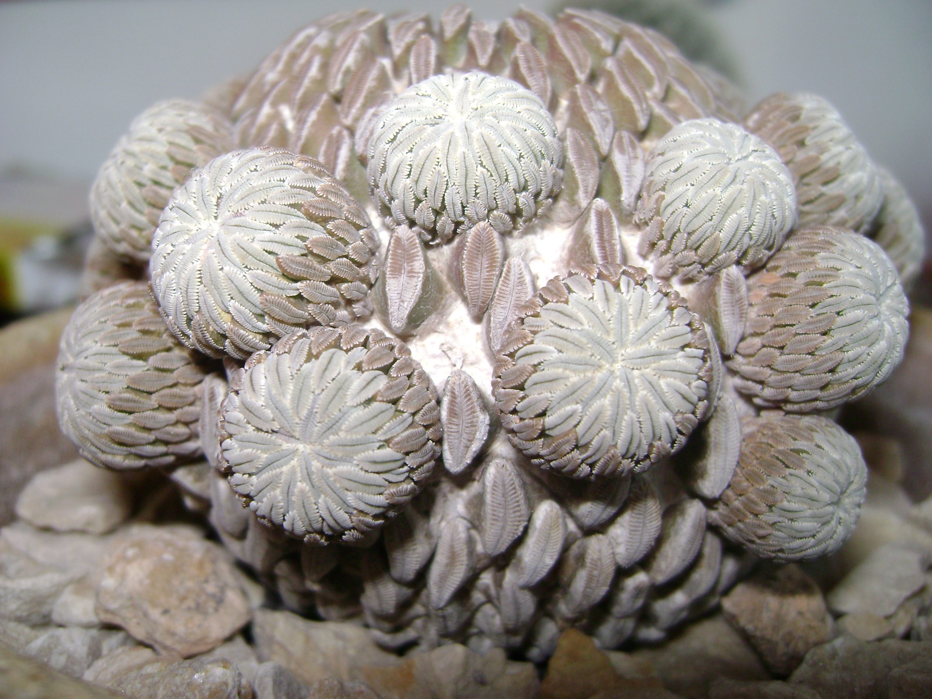 Pelecyphora aselliformis con polloni coltivata in vaso. Ragusa (Sicilia)